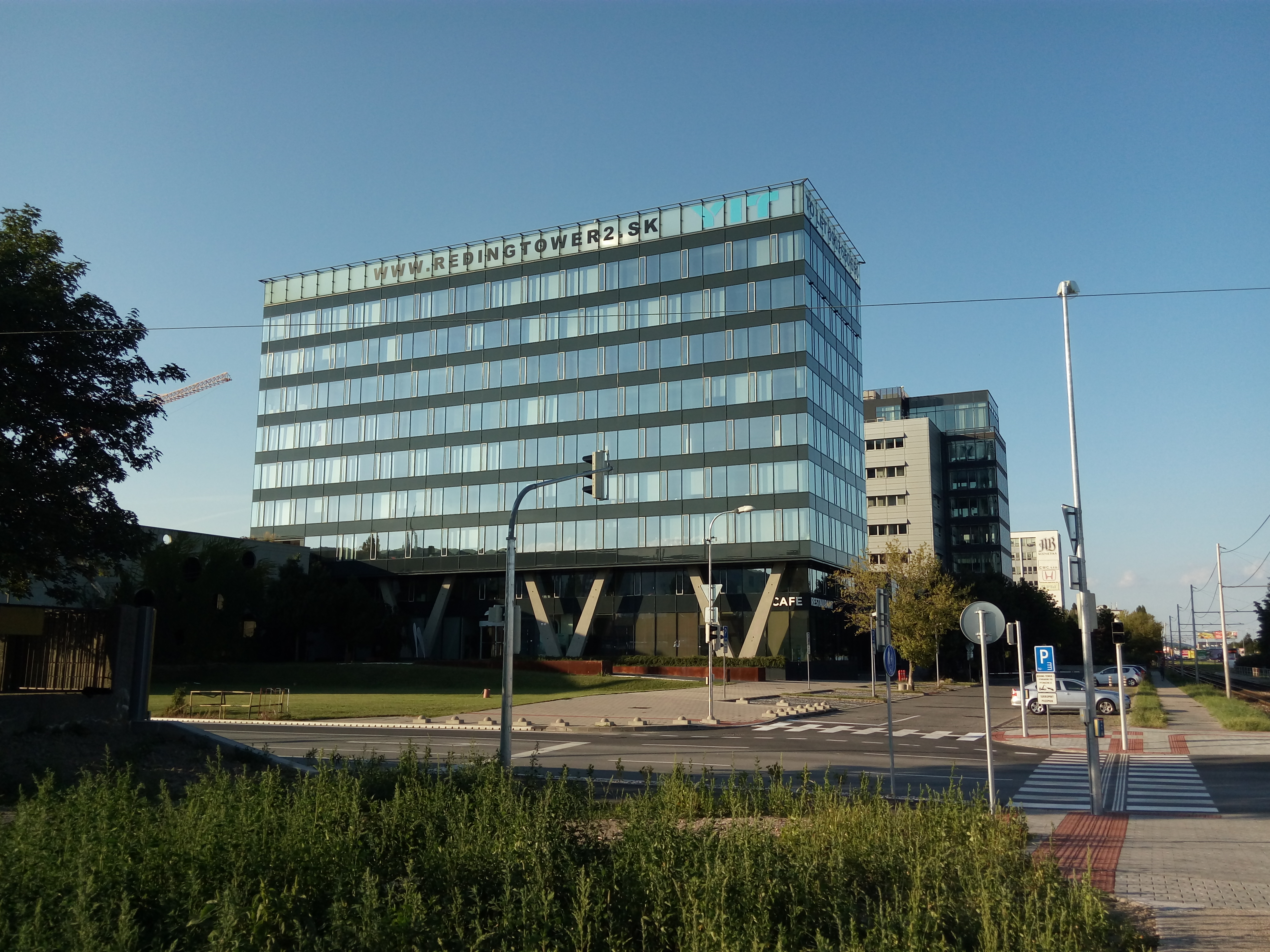 Reding Tower, Račianska, Rača, Bratislava